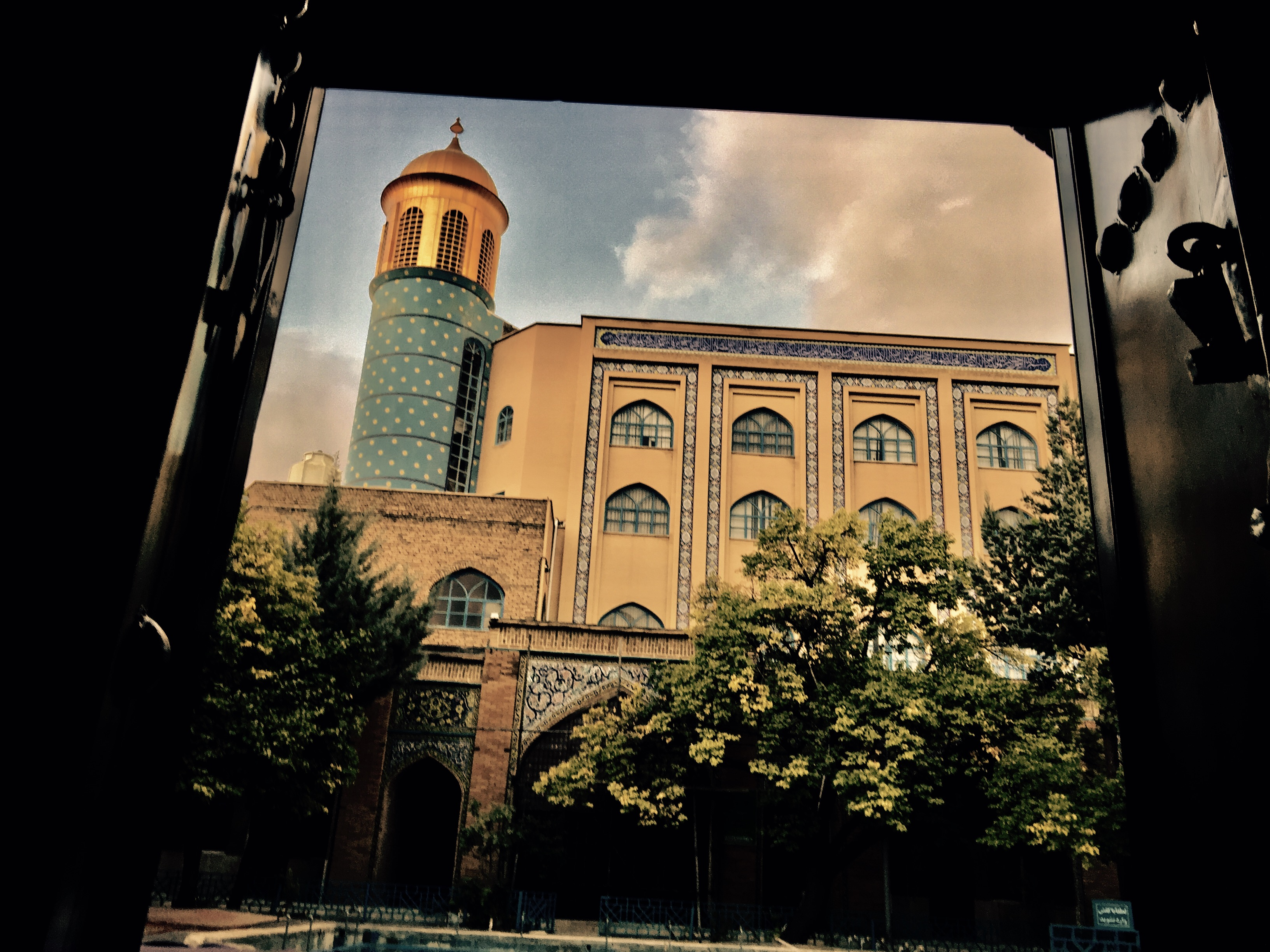 مسجد جامع (مسجد دارالاحسان)